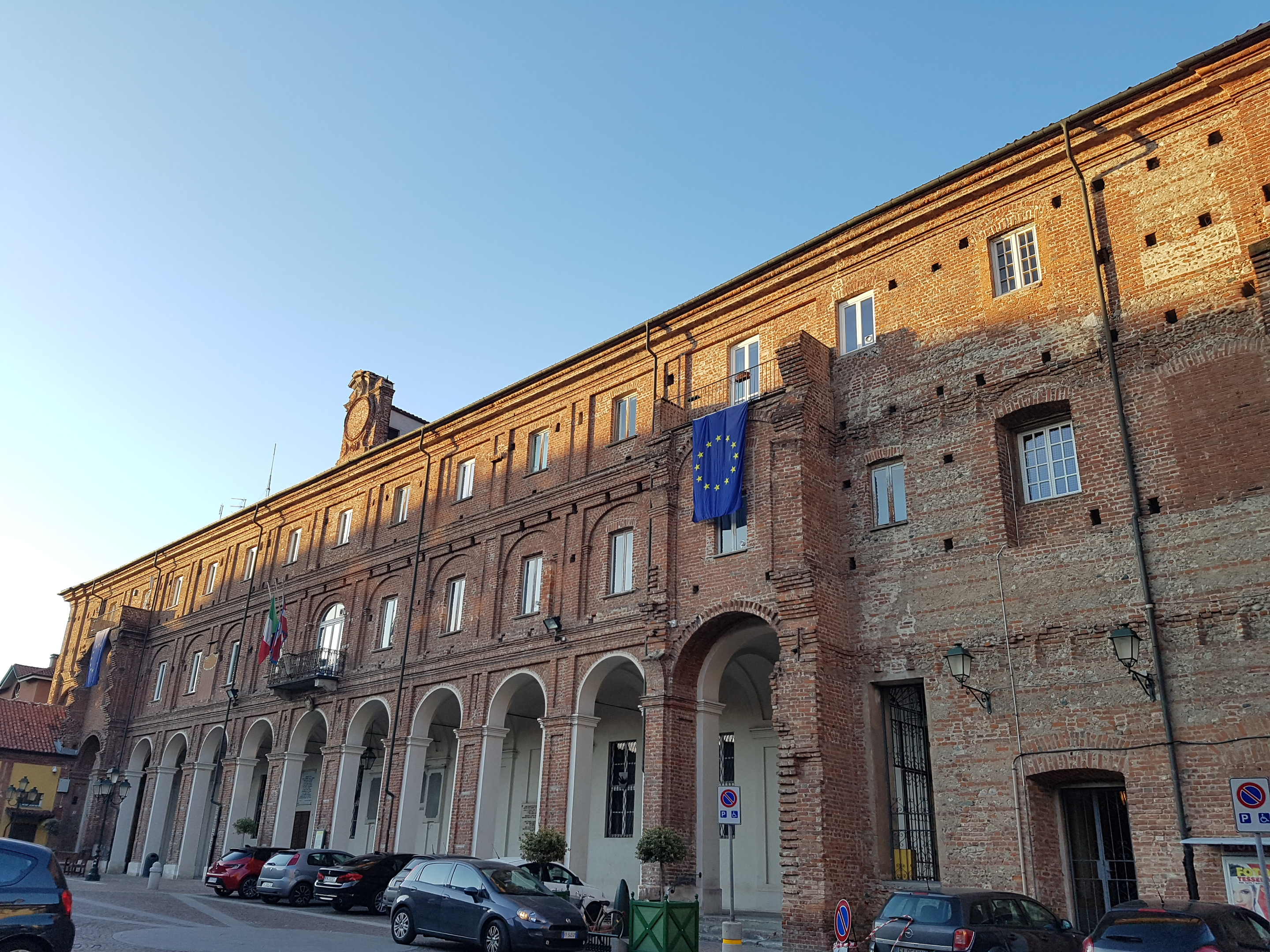 Palazzo Santa Chiara (XVIII sec.), Chivasso, Piemonte